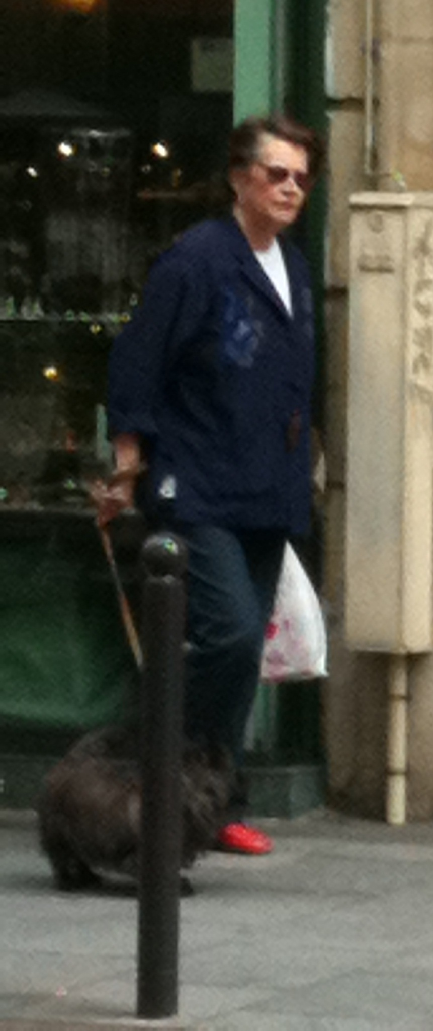 Dominique Lavanant en 2012.